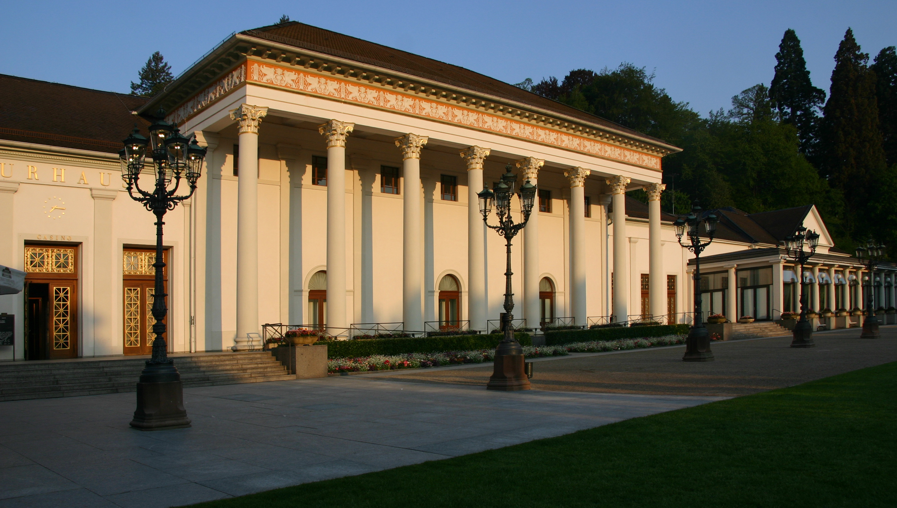 Kurhaus Baden-Baden.